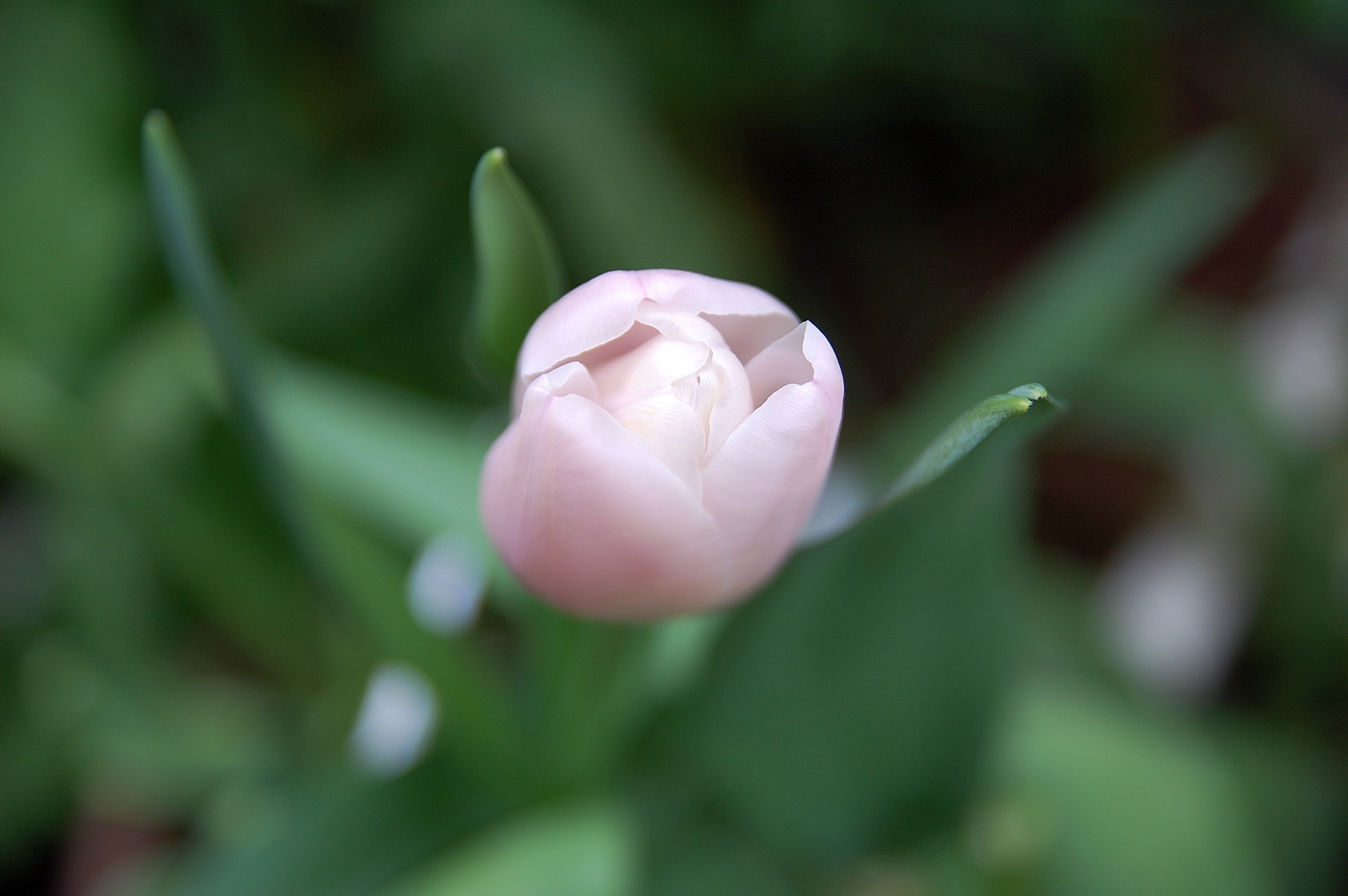 花